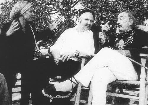 Ein Foto von einem Treffen zwischen Mercedes Vostell, Wolf Vostell und Salvador Dalí